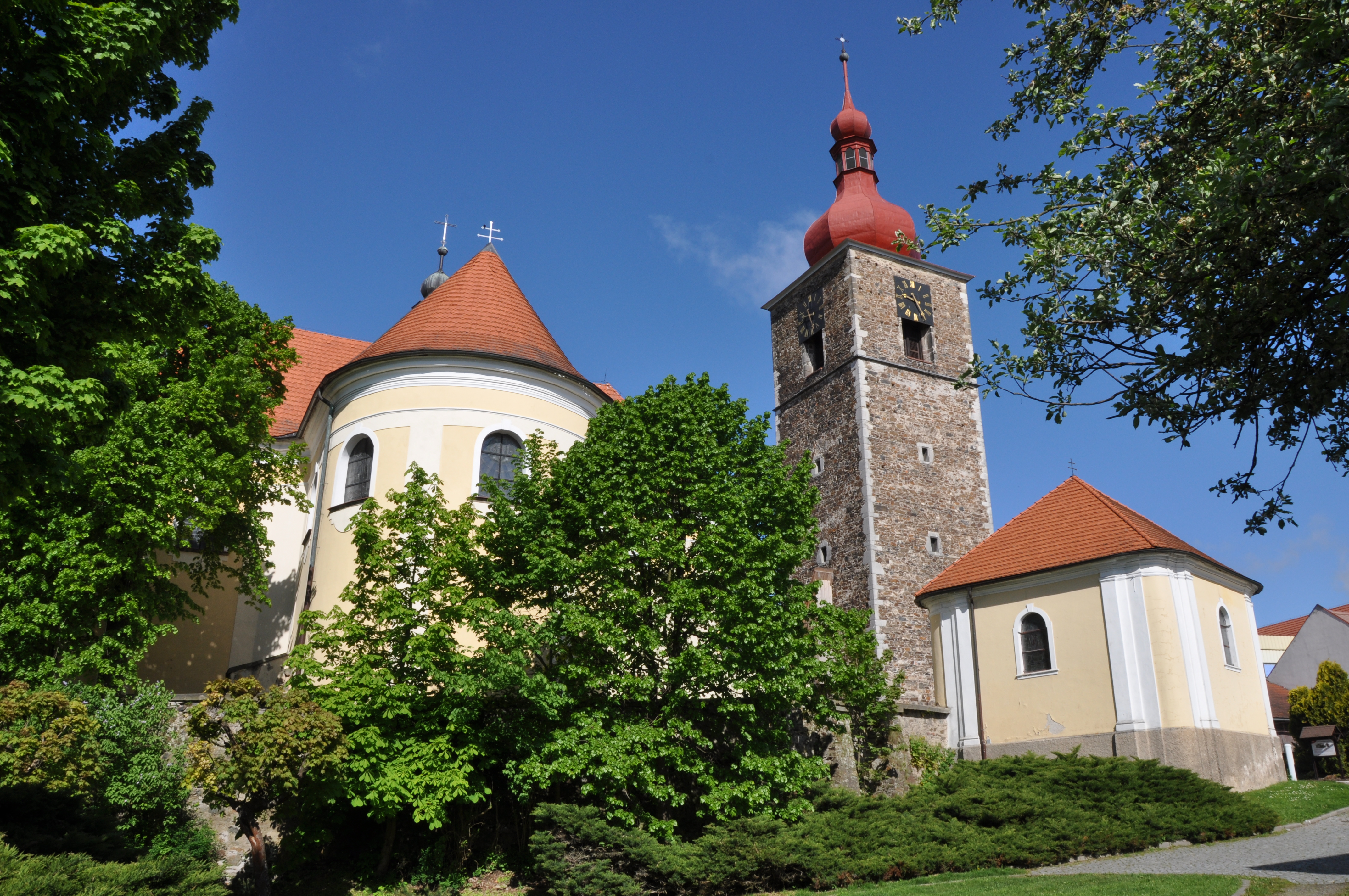 Farní kostel - Narození sv. Jana Křtitele. Základní kámen položen 1. dubna 1750 dostavěn a 24.července roku 1753 slavnostně vysvěcen. V roce 1767 postihl kostel a faru velký ničivý požár. V roce 1891 byl celý interiér kostela restaurován významným umělcem A. Suchardou. Město Přibyslav. Okr. Havlíčkův Brod. Kraj Vysočina. Czech Republik.